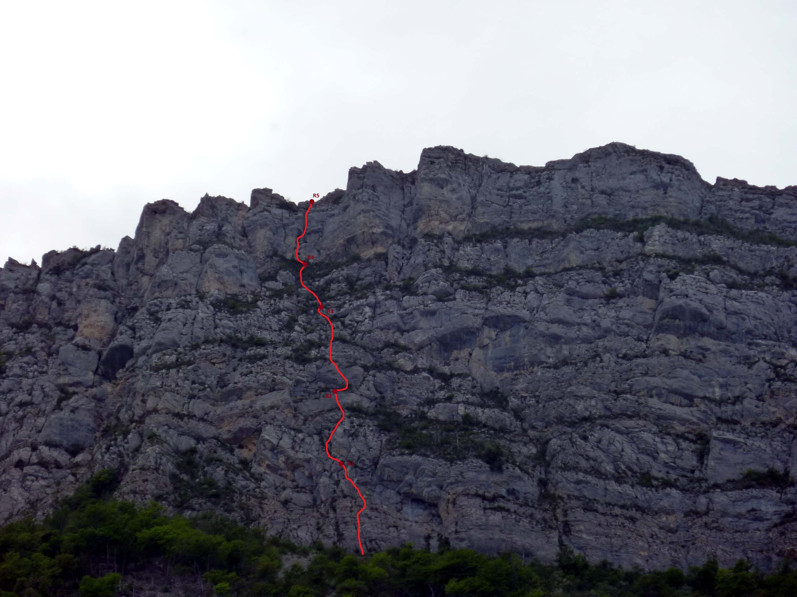 Tracé de la voie de la Coccinelle dans la face est du Néron.